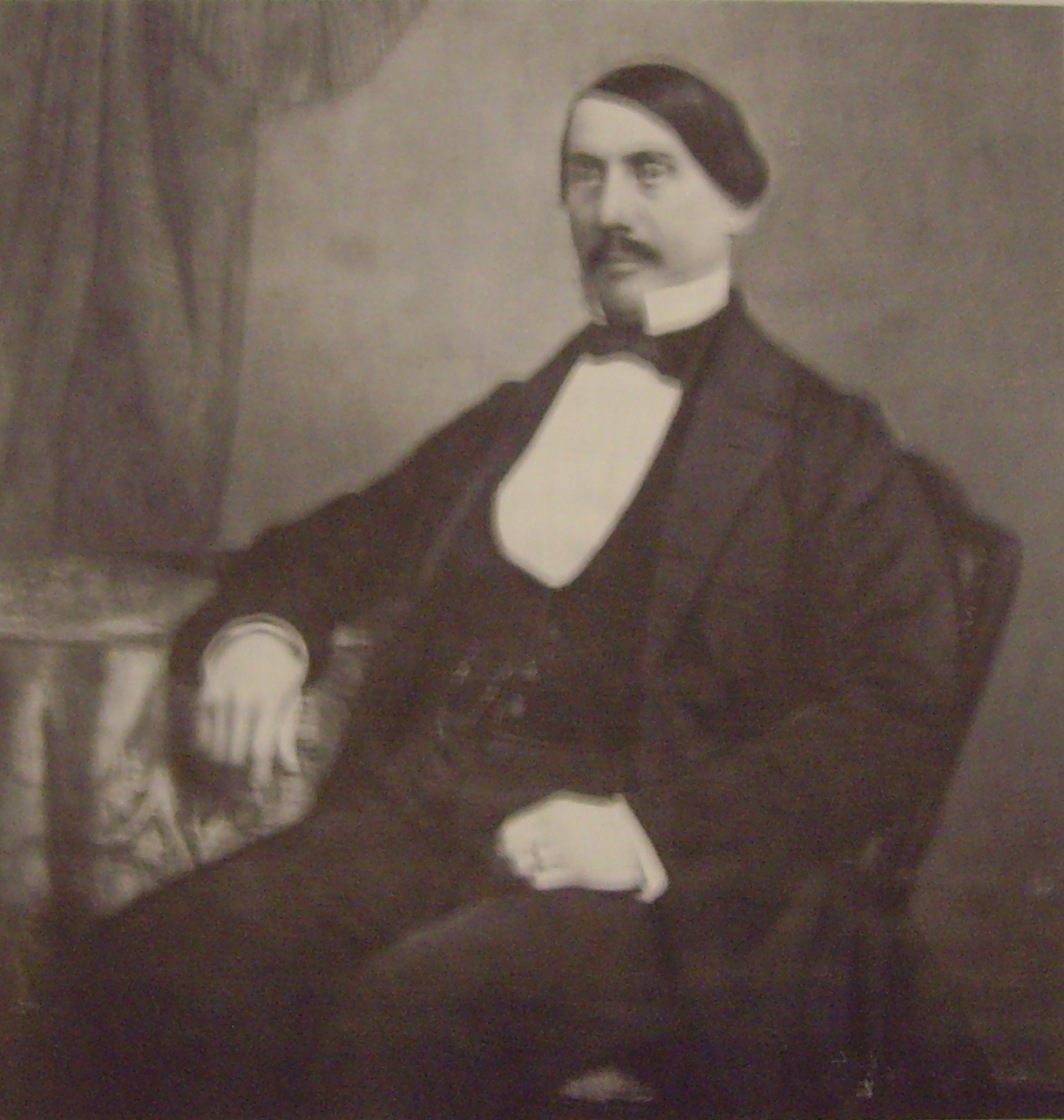 Aus dem Aussteluingskatalog (siehe Literaturliste)